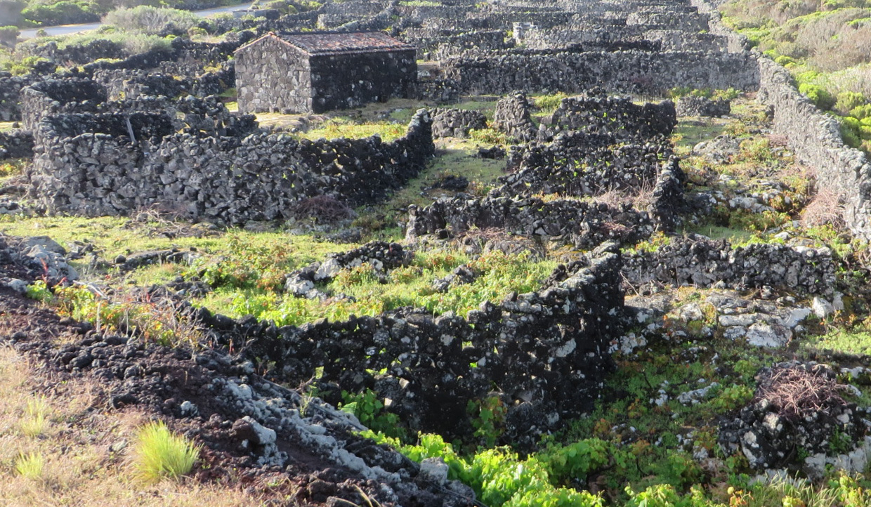 Typische Schutzmauern und Winzerhaus aus Basaltsteinen im Westen der Insel Pico nahe Criaçao Velha auf den Azoren.